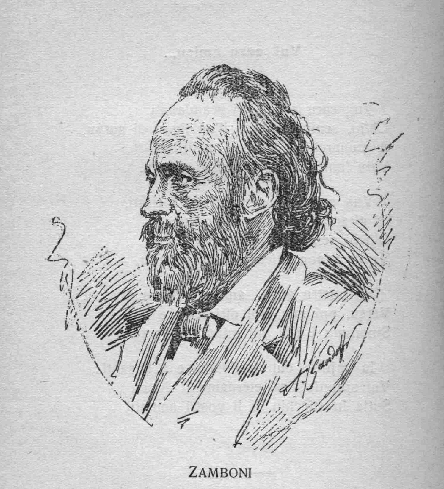 Riproduzine schizzo di Filippo Zamboni